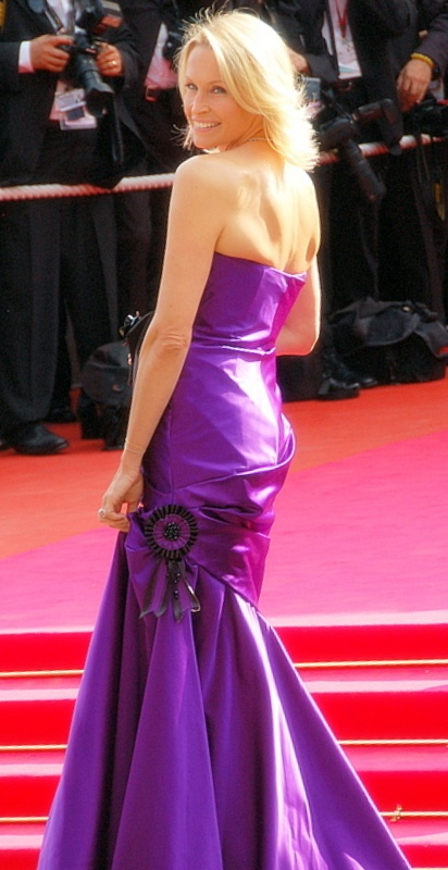 Estelle Lefébure au festival de Cannes